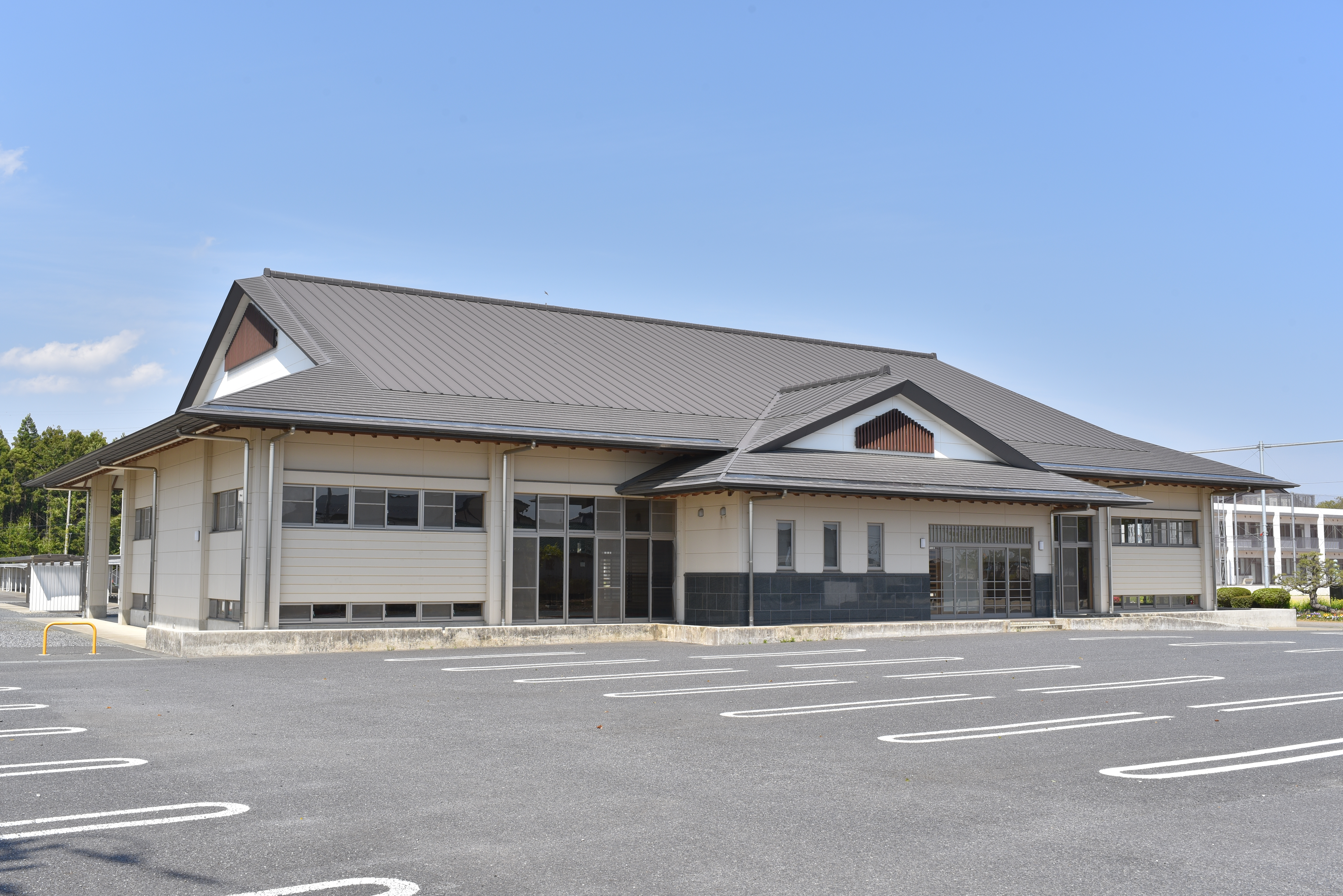 土浦市立新治学園義務教育学校の武道館。正門のすぐ西側にある。